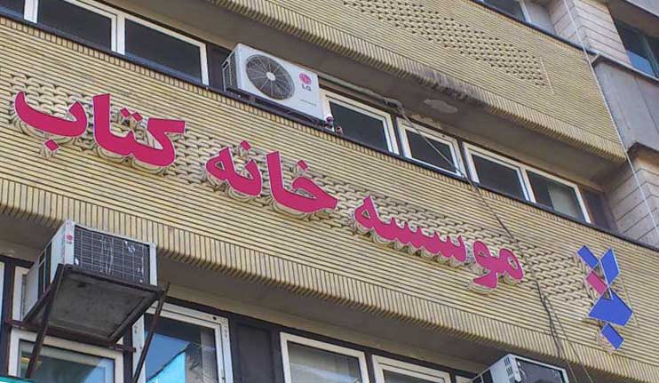 موسسه خانه کتاب ایران